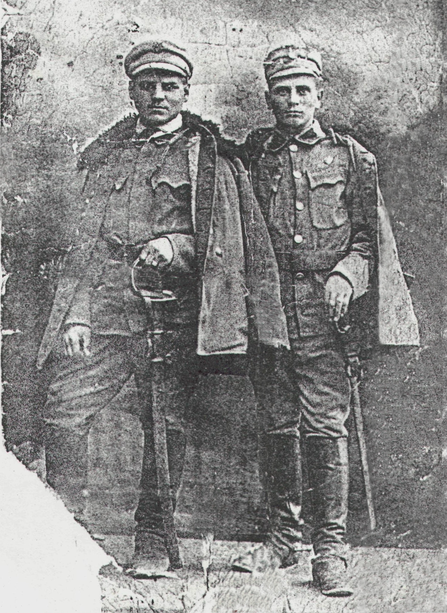 Wiatr Jan, ur. 15.12.1895r. w Stróżach Niżnych, żołnierz , bombardier 1 Pułku Artylerii Legionów Polskich, odznaczony srebrnym krzyżem Orderu „Virtuti Militari”